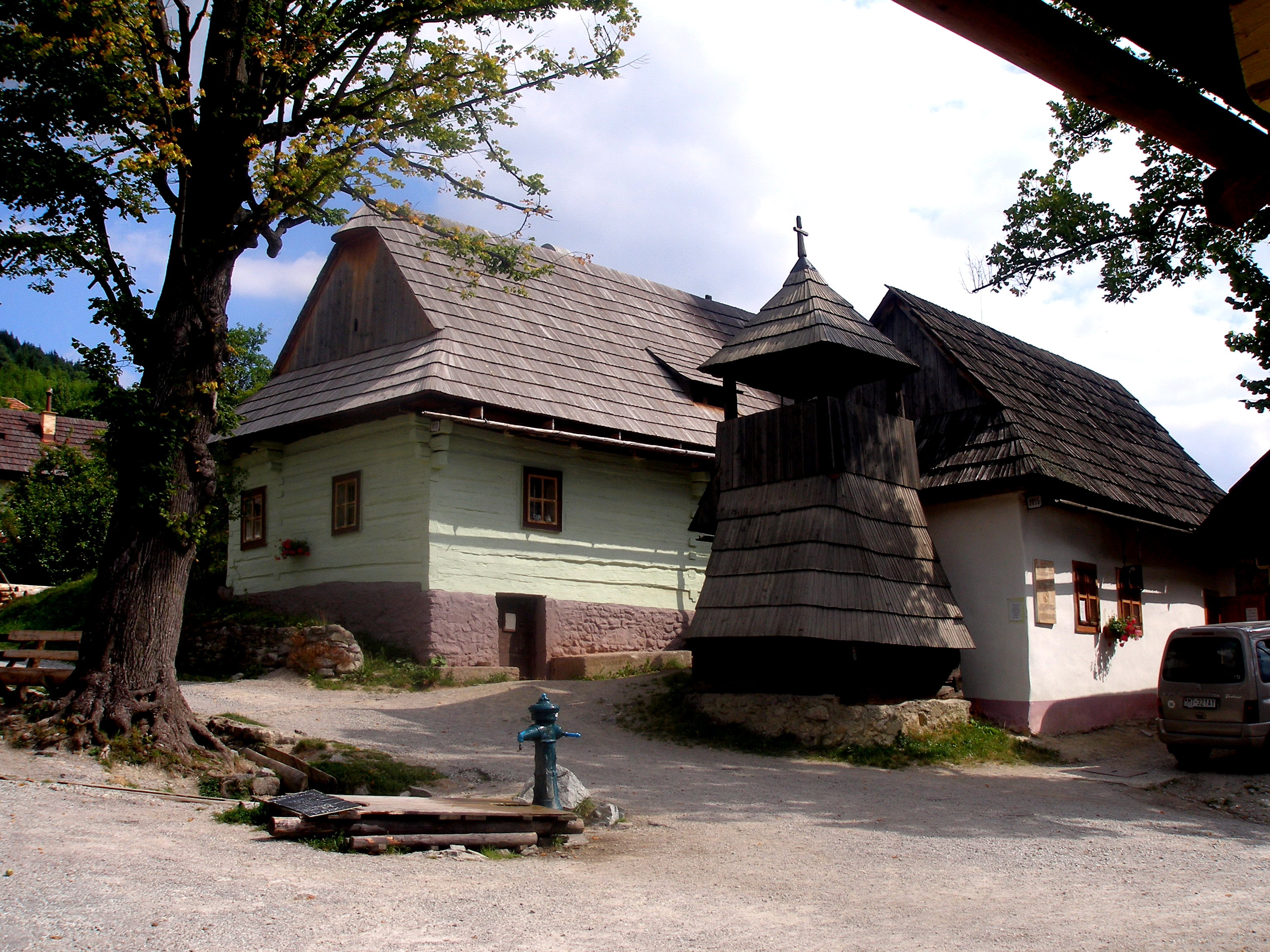 Vlkolínec pamiatka UNESCO. Ružomberok rok 2006.